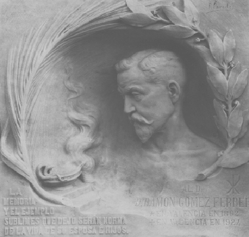 Lápida del nicho de la tumba del doctor Don Ramón Gómez Ferrer que se encuentra en el cementerio de la ciudad de Valencia.